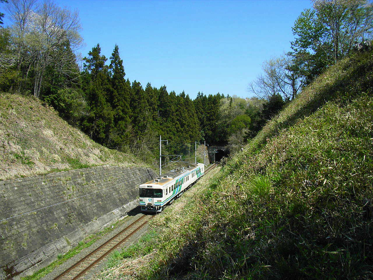 A train of Abukuma Kyuko Line. Kakuda, Miyagi prefecure, Japan.